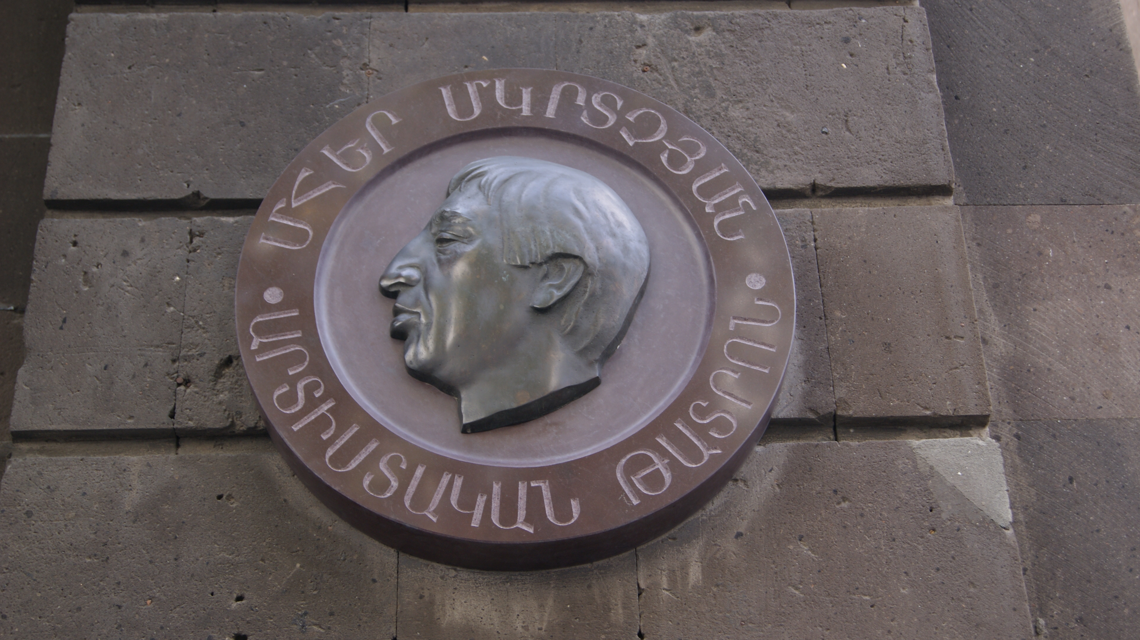 Մովսես Խորենացու 18, Մհեր Մկրտչյան թատրոն 6/167